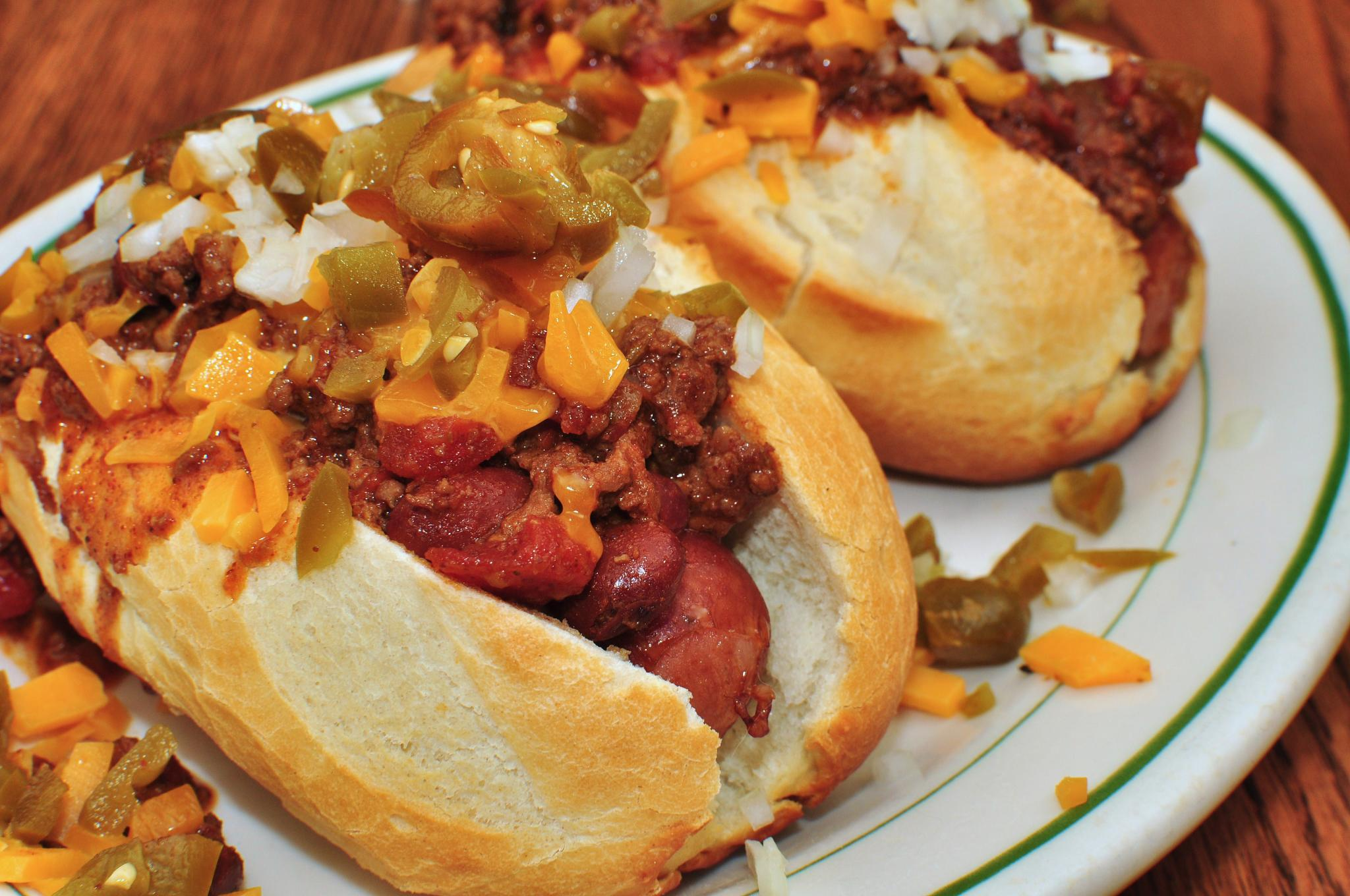 Chili dogs